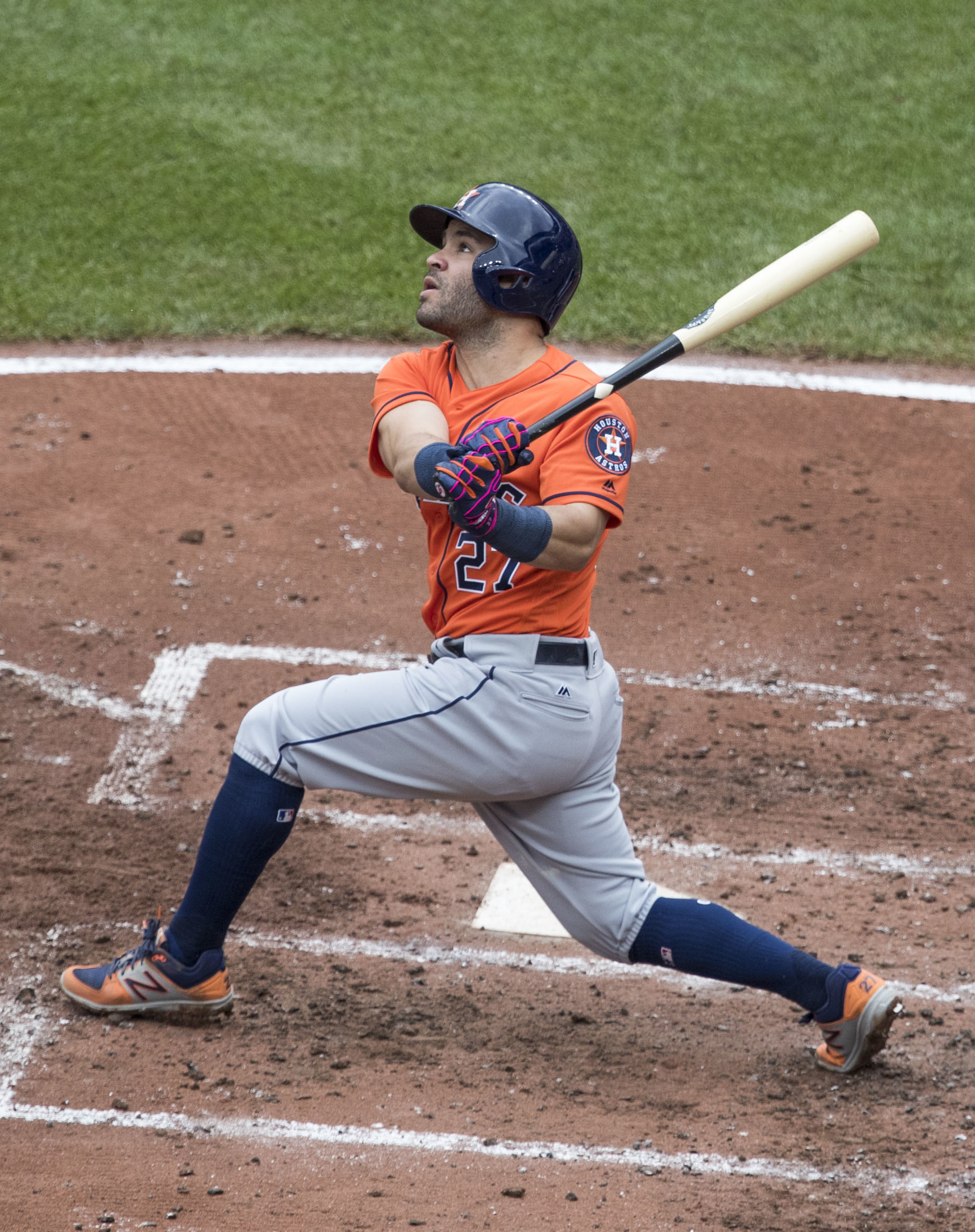 Astros at Orioles 7/23/17